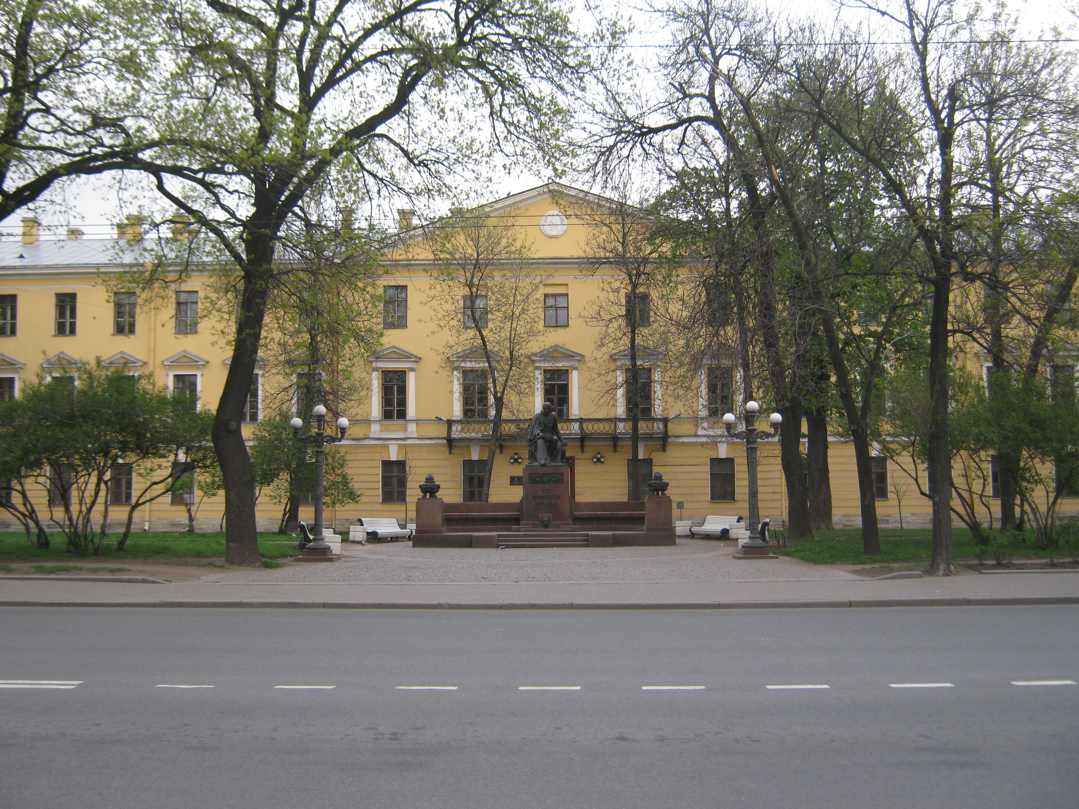 Фасад главного здания Николаевского кавалерийского училища на Лермонтовском проспекте